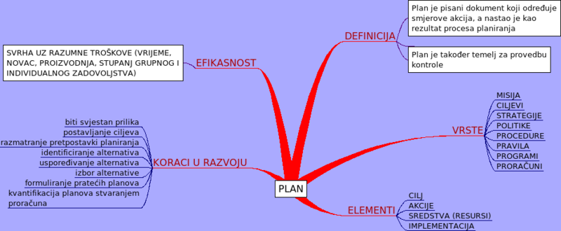 Mentalna mapa sa obilježjima plana